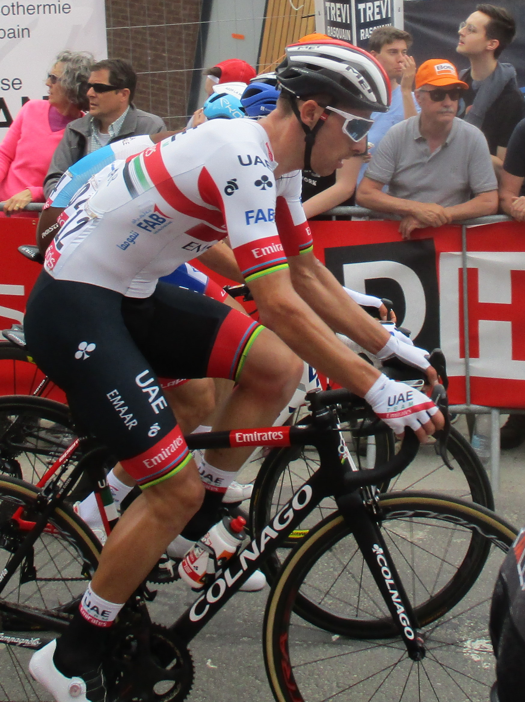 Tweede passage van de Waalse Pijl 2019 voor mannen op de Mur de Huy